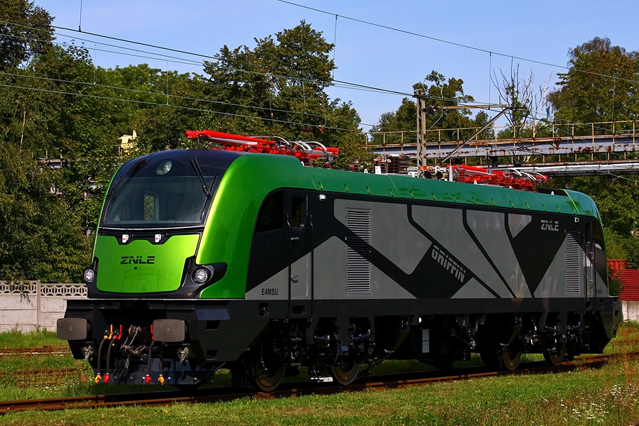 E4MSU